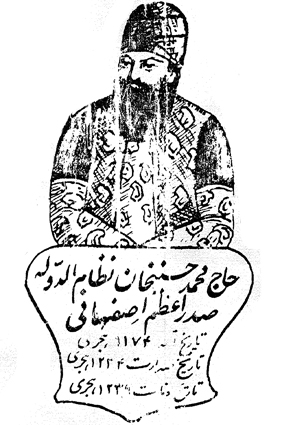 عکس محمد حسین خان صدر اصفهانی که در شجره نامه ایشان آمده است